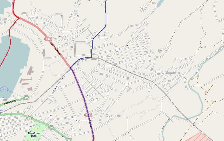 Den blåe streken viser skiller mellom Rønvik Vest og Rønvik Øst. Den røde streken er grensen mot Burøya og Kvalvika, som verken regnes som Rønvik Øst eller Rønvik Vest, og har fått navnet Rønvik Nord.